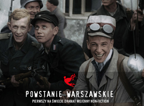 Materiały prasowe "Powstanie Warszawskie"/Muzeum Powstania Warszawskiego